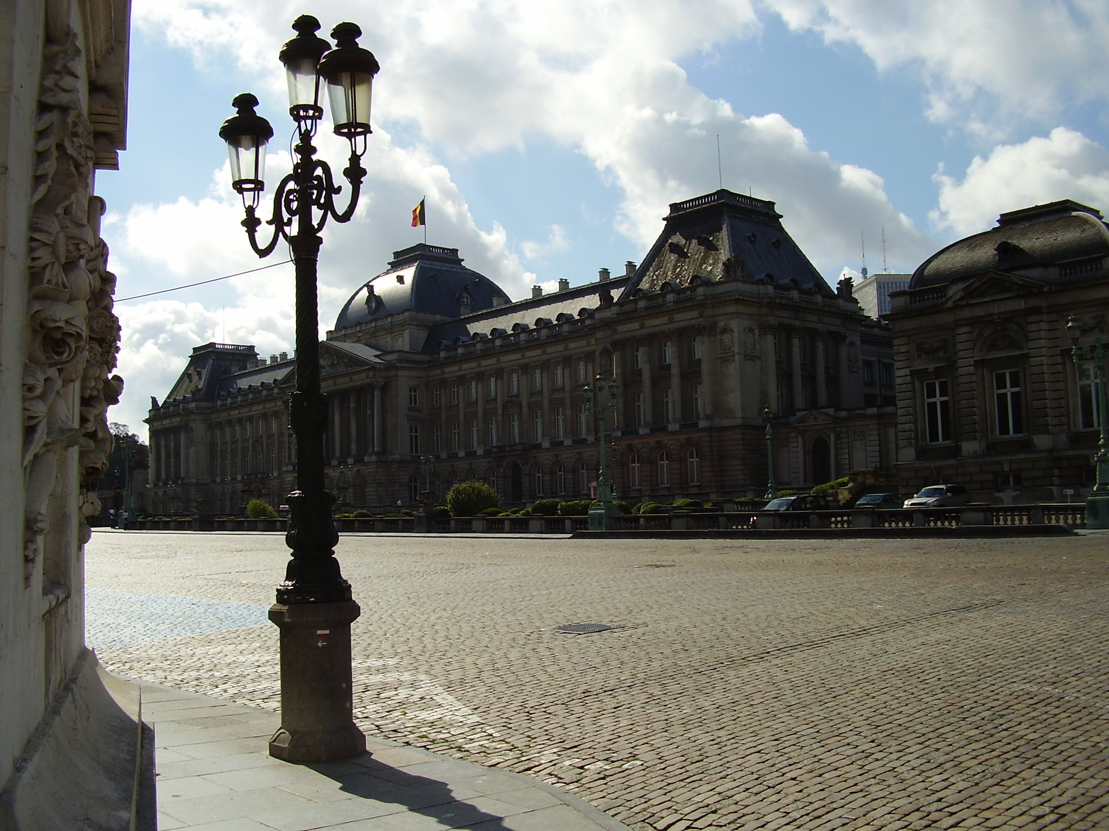 Ulice před belgickým královským palácem, Brusel, Belgie